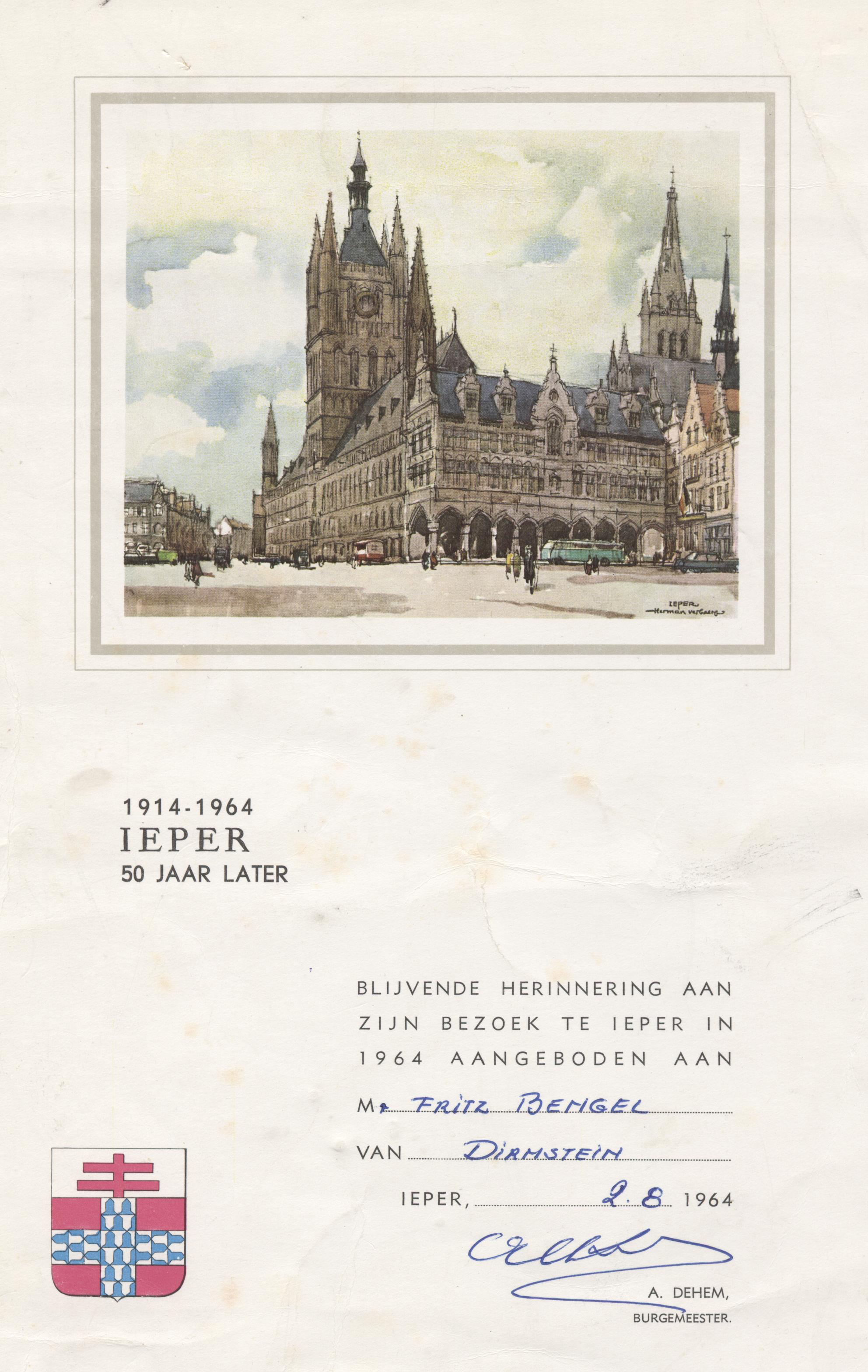 Friedrich Bengel, Träger der bayerischen Tapferkeitsmedaille, Erinnerungsurkunde Besuch Schlachtfeld Ypern, eigener Scan von eigener Urkunde im eigenen Besitz